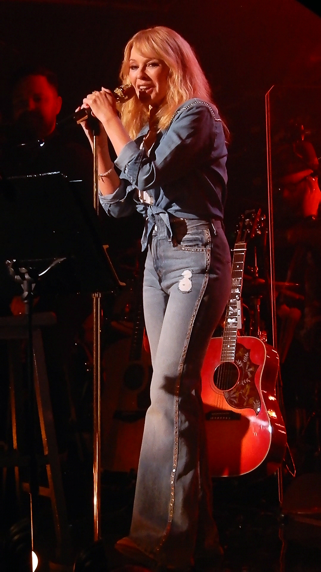 Kylie Minogue - Kylie Presents Golden Tour - Gorilla - Manchester - 14.03.18 - 026